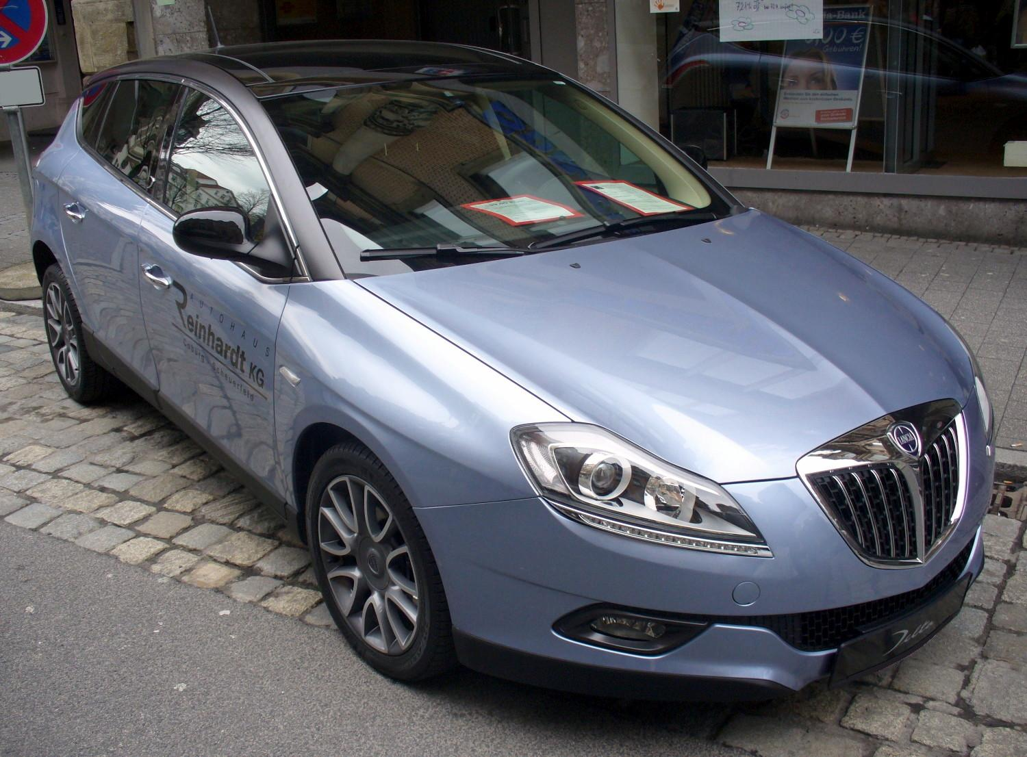 Lancia Delta